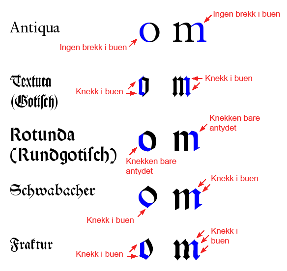 Forskjeller i buer mellom brukne og runde skrifttyper (eller: Forskjeller i skrifttyper med og uten knekk i bokstavbuene)